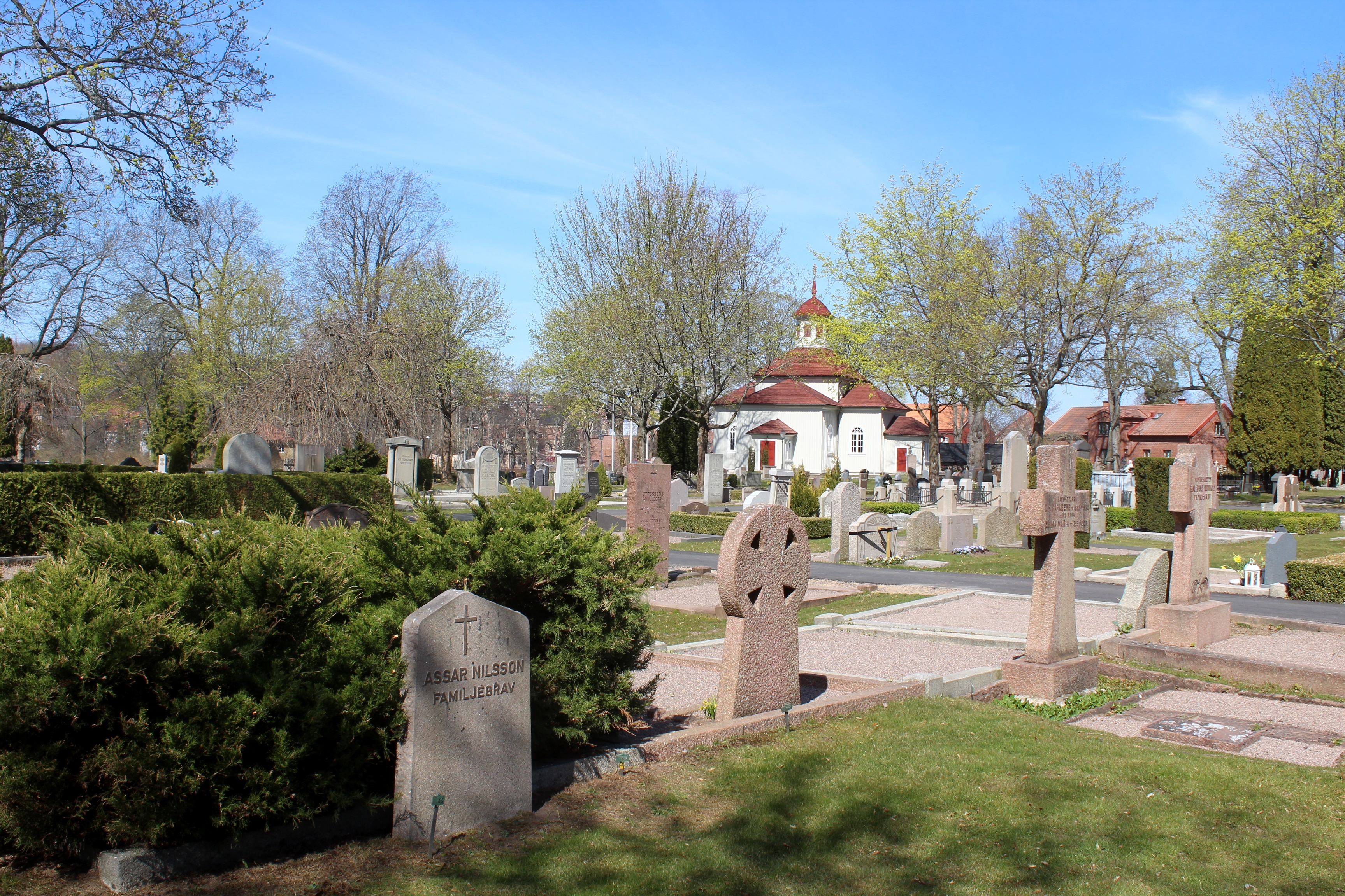 Slottskyrkogården, Jönköping, med kapellet i bakgrunden